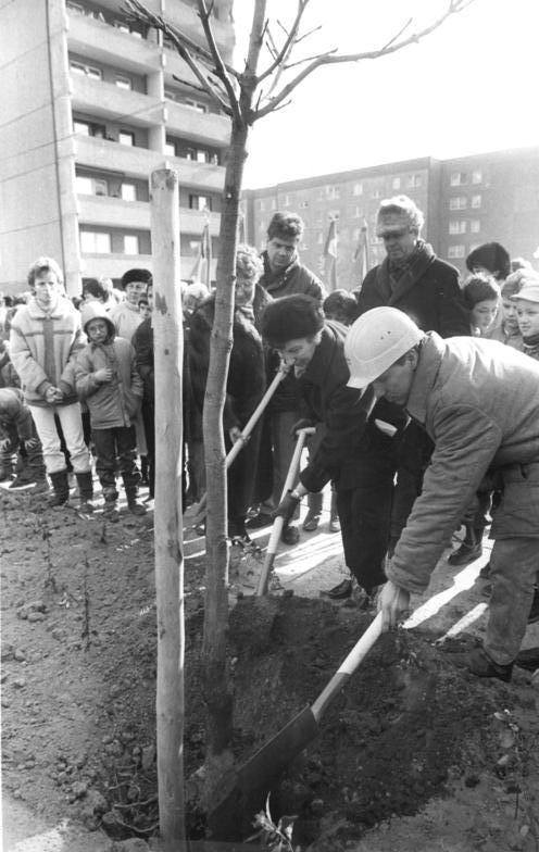 ADN-ZB Mittelstädt-4.3.87-Berlin: XII. DFD-Kongreß- Zetkin-Park. Am Vorabend des XII. Bundeskongresses des DFD erfolgte die Einweihung und Namensgebung des künftigen Wohngebietsparkes "Clara Zetkin" in Marzahn-Nord. Die Vorsitzende des DFD, Ilse Thiele (2.v.r.), und Delegierte des Kongresses pflanzten symbolisch die ersten Bäume für den Park, der ein Geschenk der Frauenorganisation an die Hauptstadt der DDR, Berlin, zum 750. Gründungsjubiläum ist.